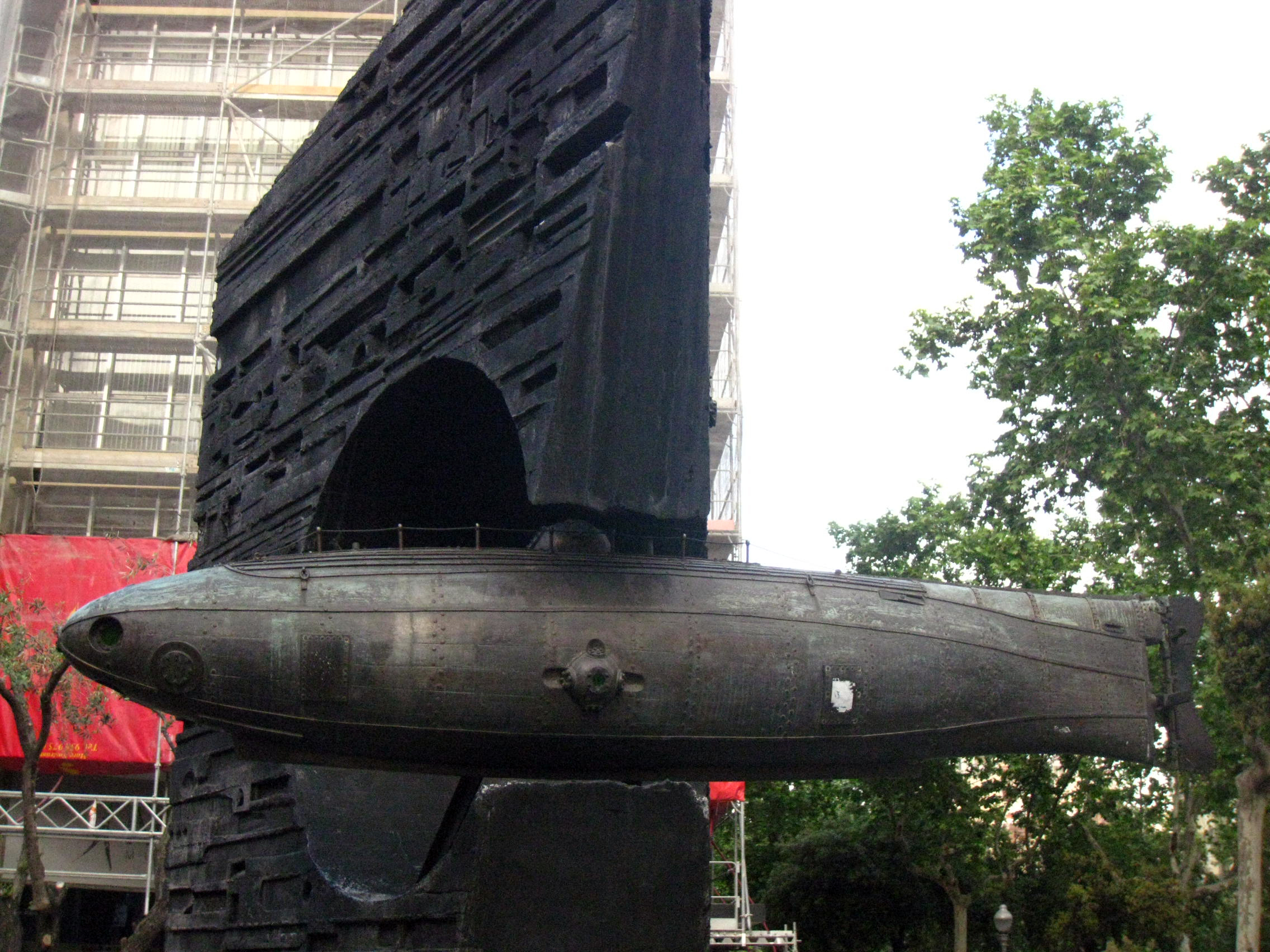 A Narcís Monturiol (Josep Maria Subirachs). Av. Diagonal, 341 (Barcelona)